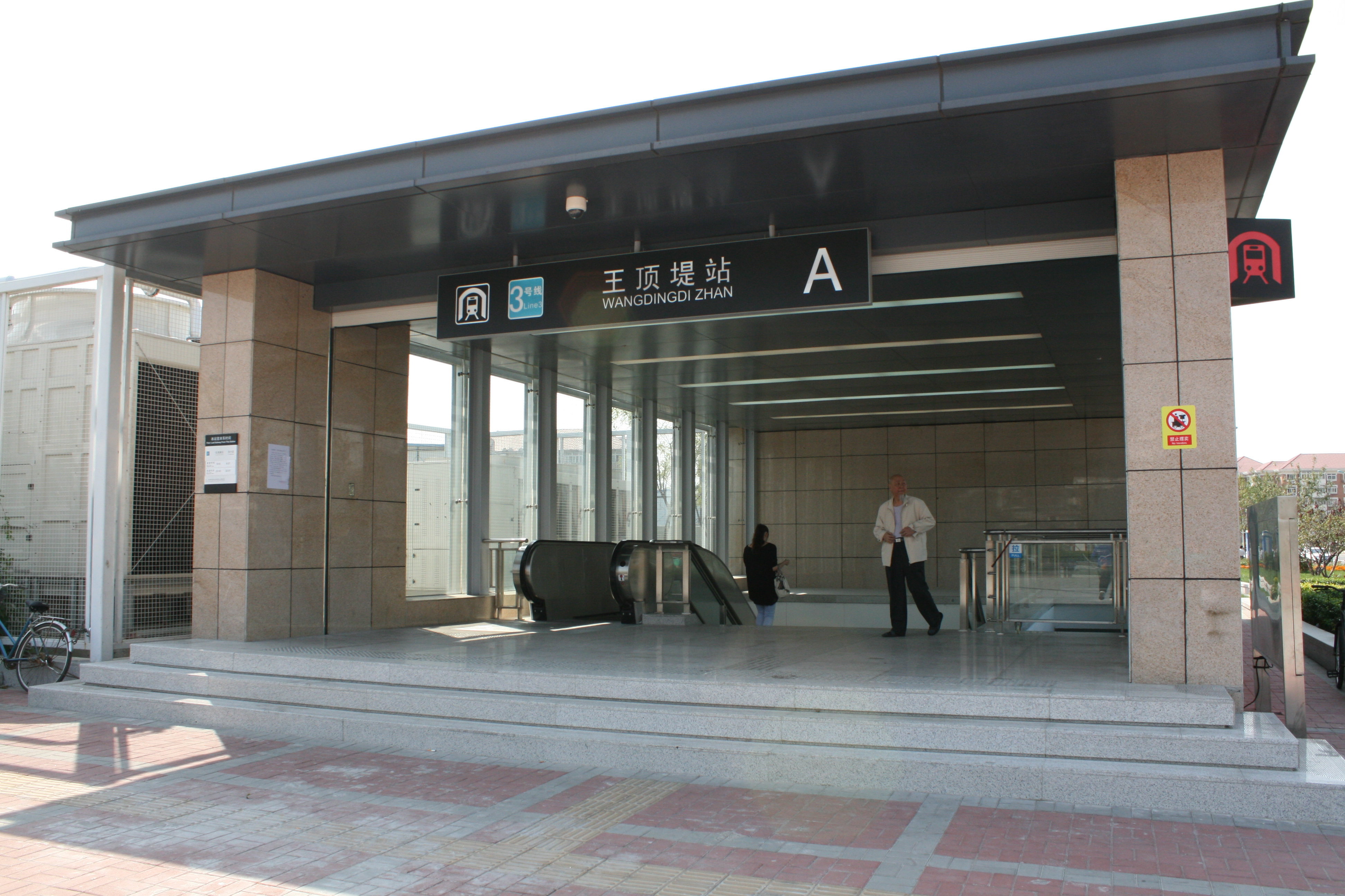 天津地鐵三號線王頂堤站A出口 0001